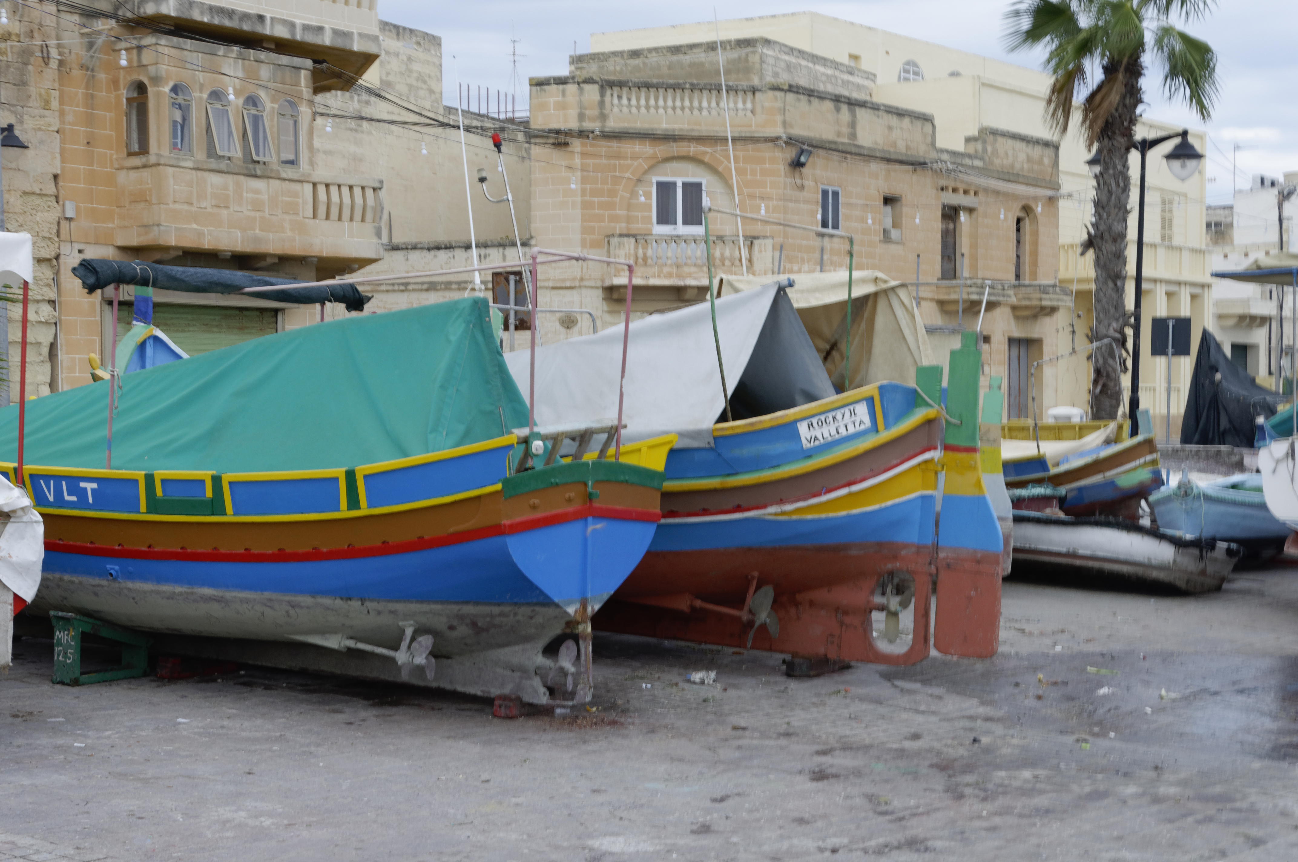 Malta-mix- 2019